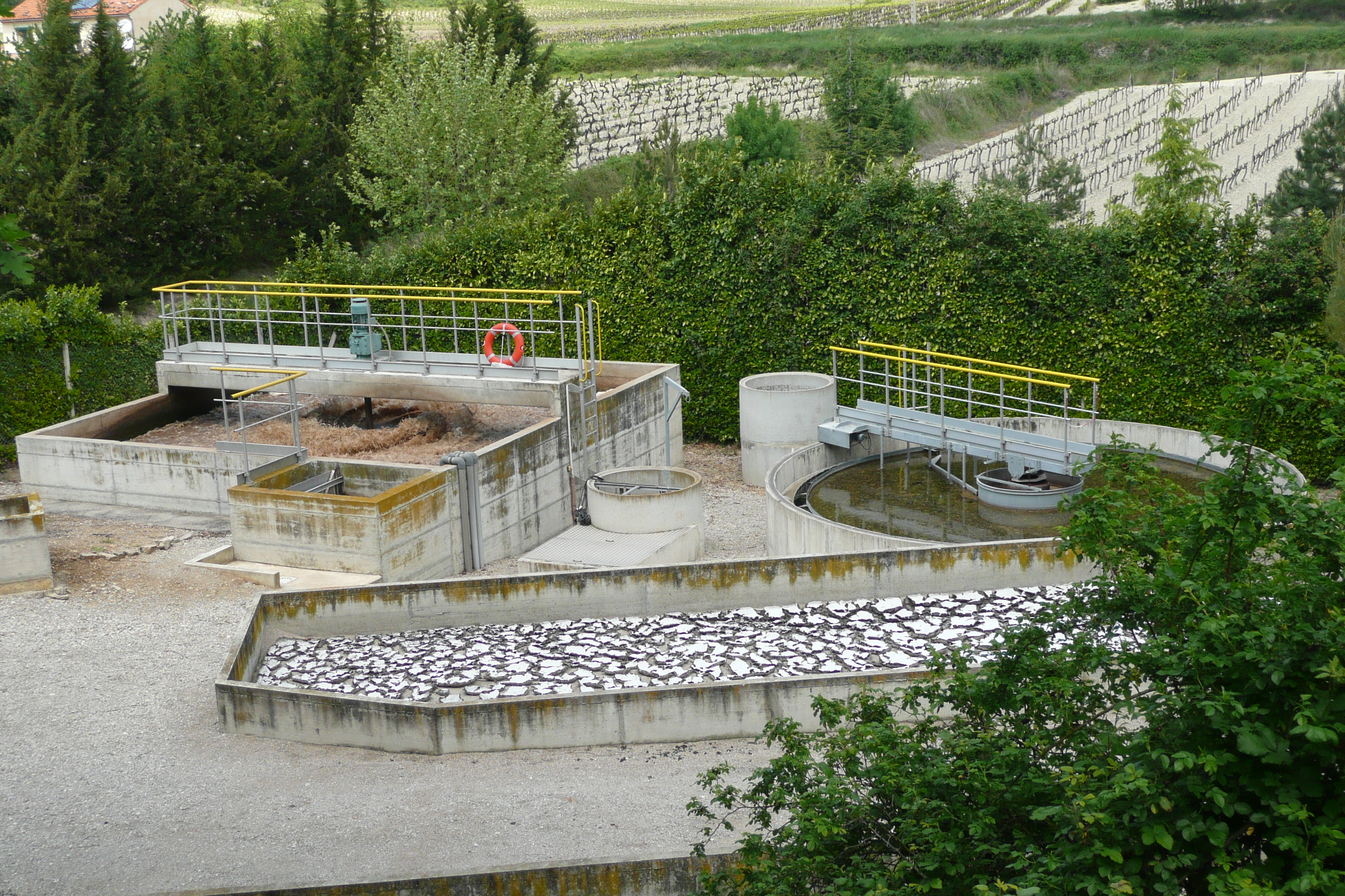 Épuration des eaux (Sewage).